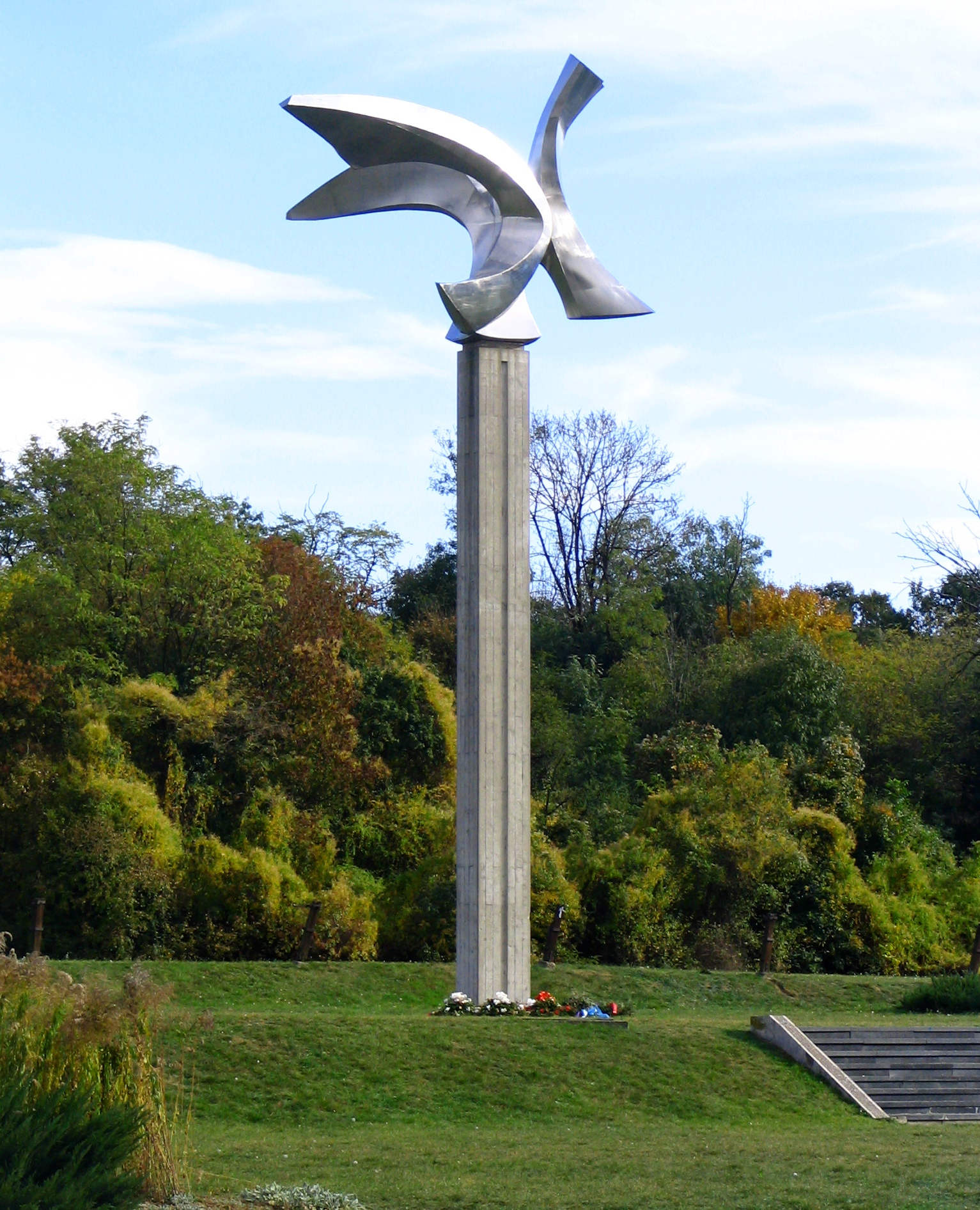 Spomenik žrtvama pogubljenim na strelištu u Jajincima, rad vajara Vojina Stojića, otkriven 1.oktobra 1988. godine